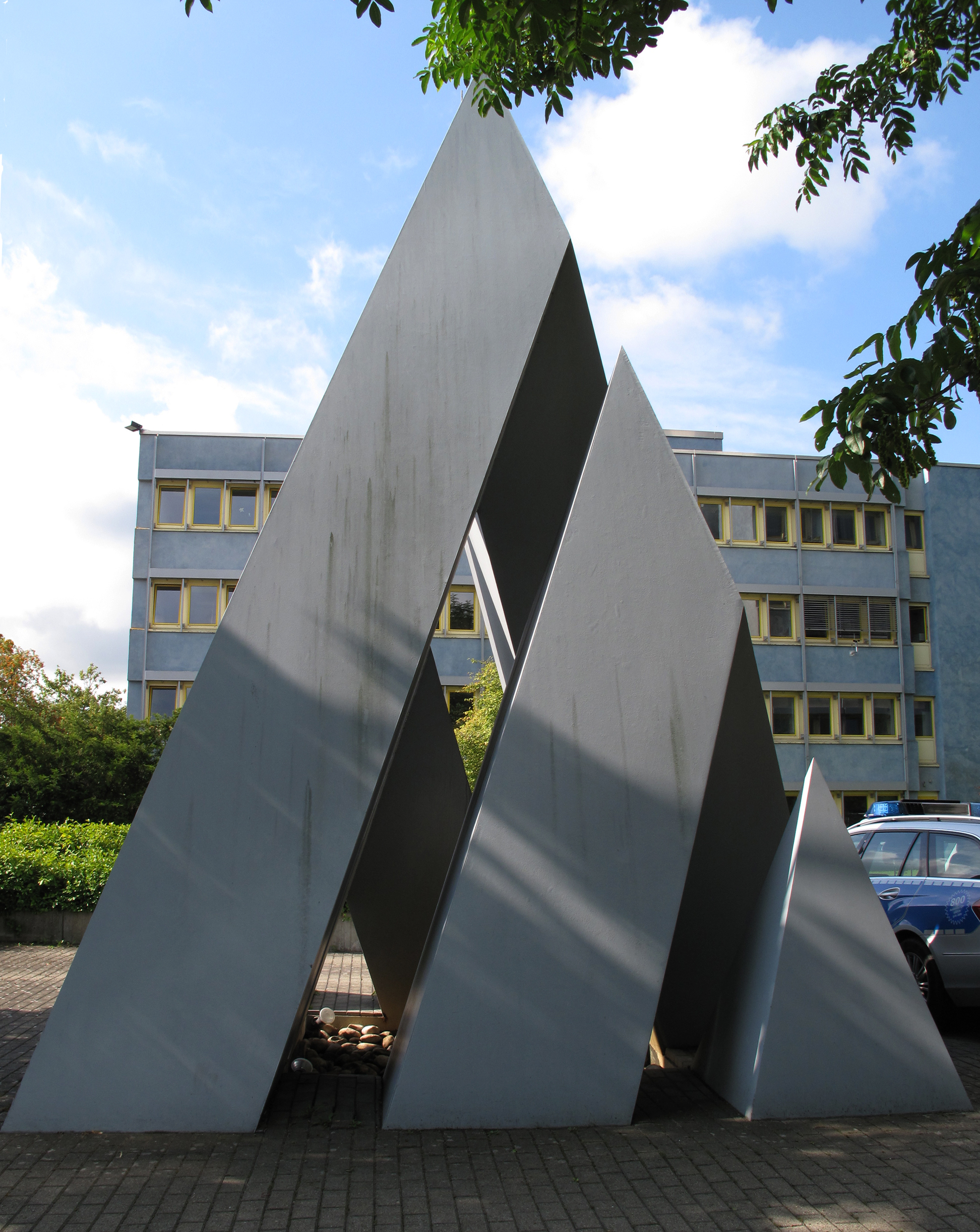 Bernard Schottlander, Pyramide, 1976- Deutschland, Baden-Württemberg, Tübingen, Konrad-Adenauerstr. 30, vor der Polizeidirektion Tübingen